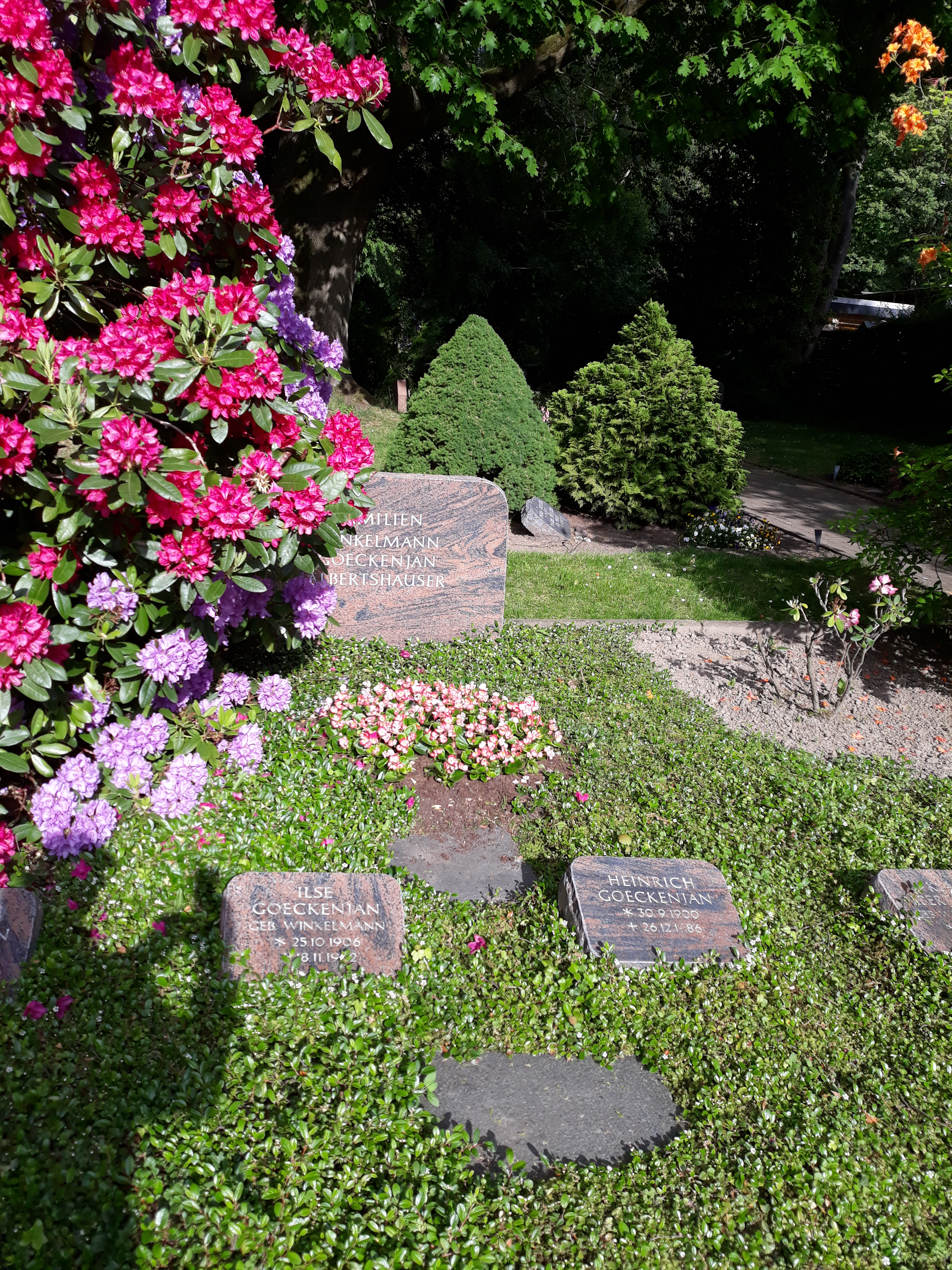 Das Grab des nationalsozialistischen Politikers und Landwirts Heinrich Göckenjan und seiner Ehefrau Ilse geborene Winkelmann auf dem Friedhof in Dortmund-Oespel.